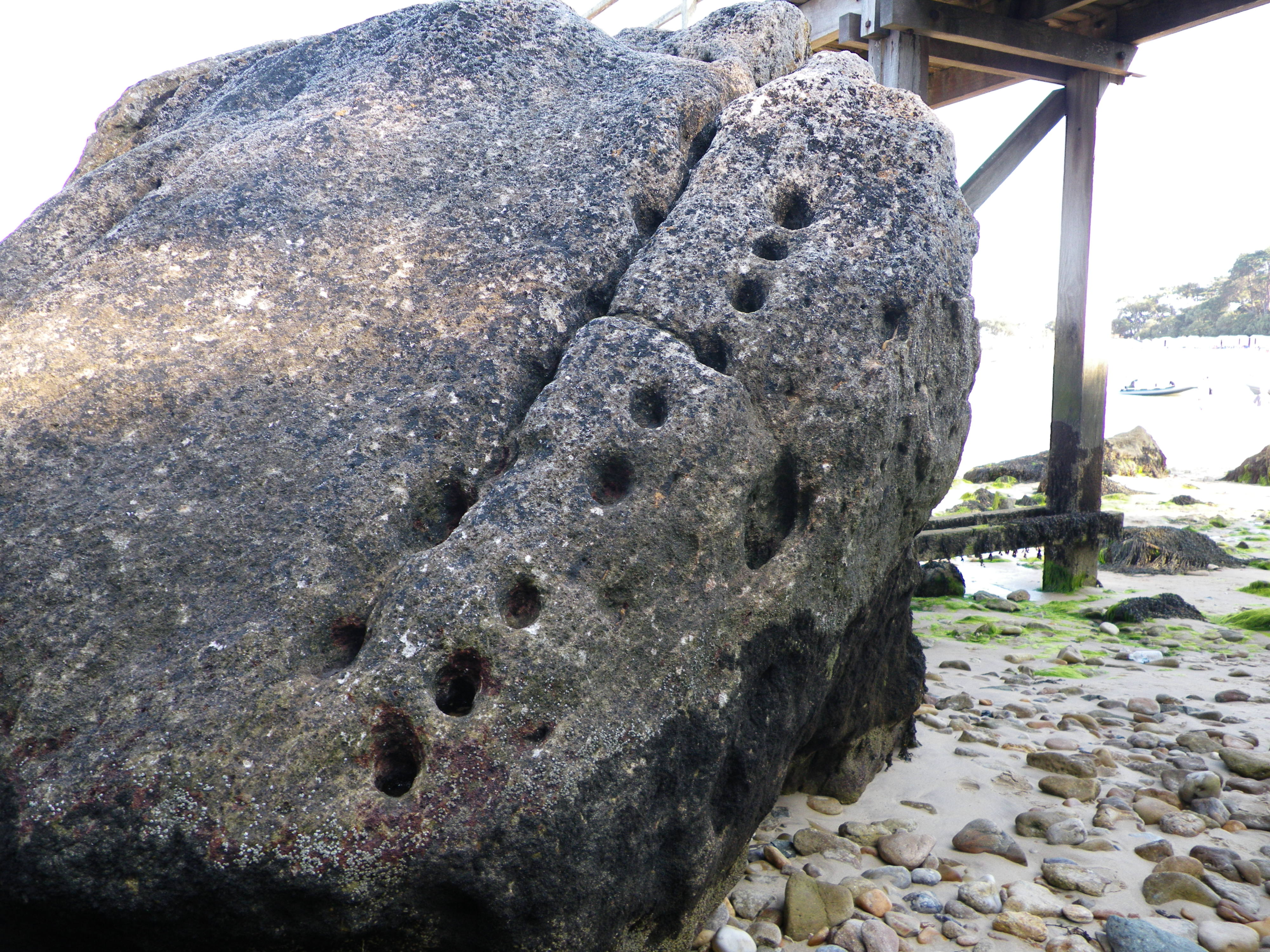 Pierre a cupules située au pied de l'embarcadère de la plage des dames a Noirmoutier.